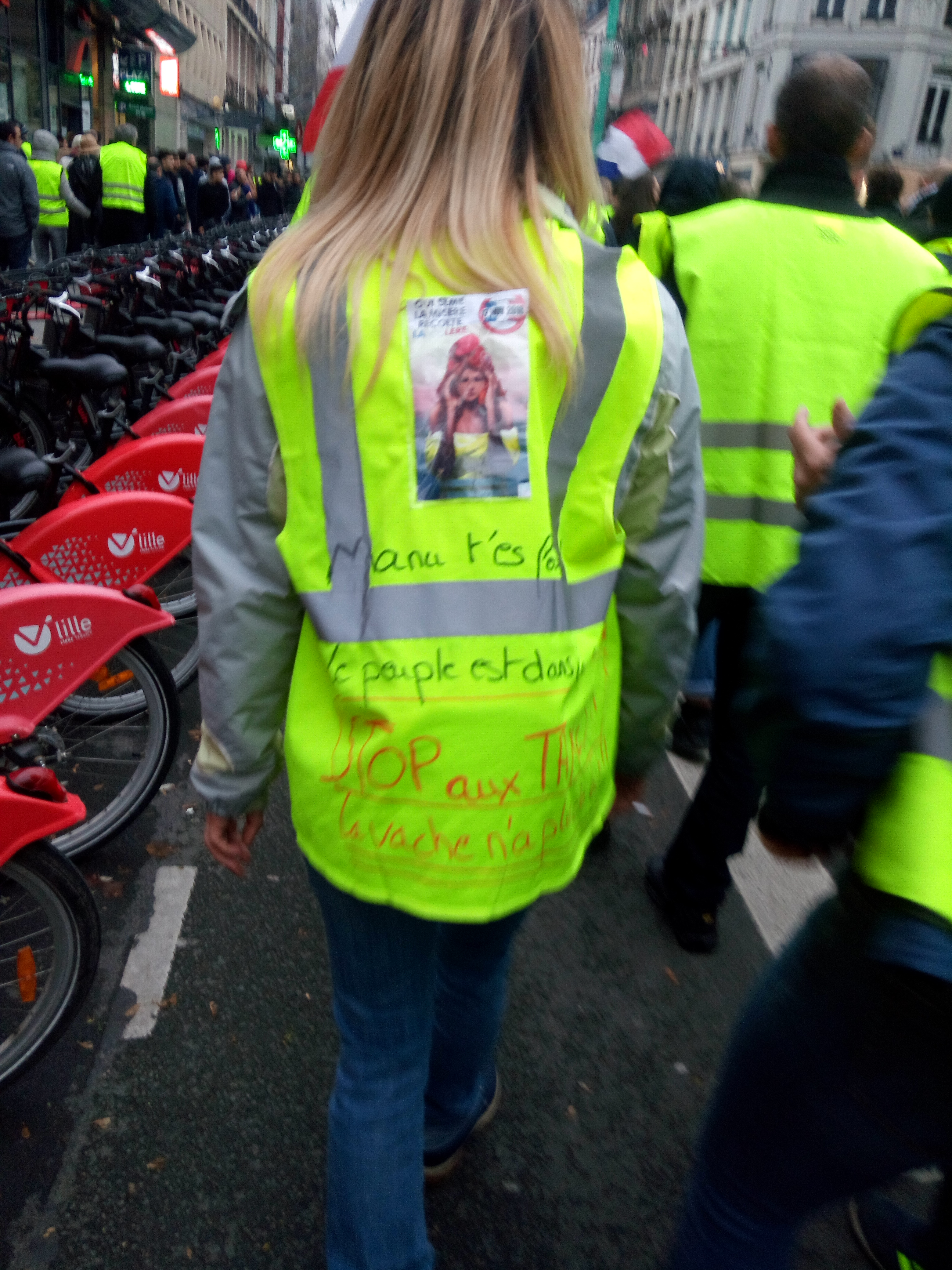 Gilet jaune à Lille: "Qui sème la misère récolte la colère" Marianne au bonnet phrygien suivi de : "Manu t'es foutu Le peuple est dans la rue" "Stop au taxe La vache n'a plus de lait"